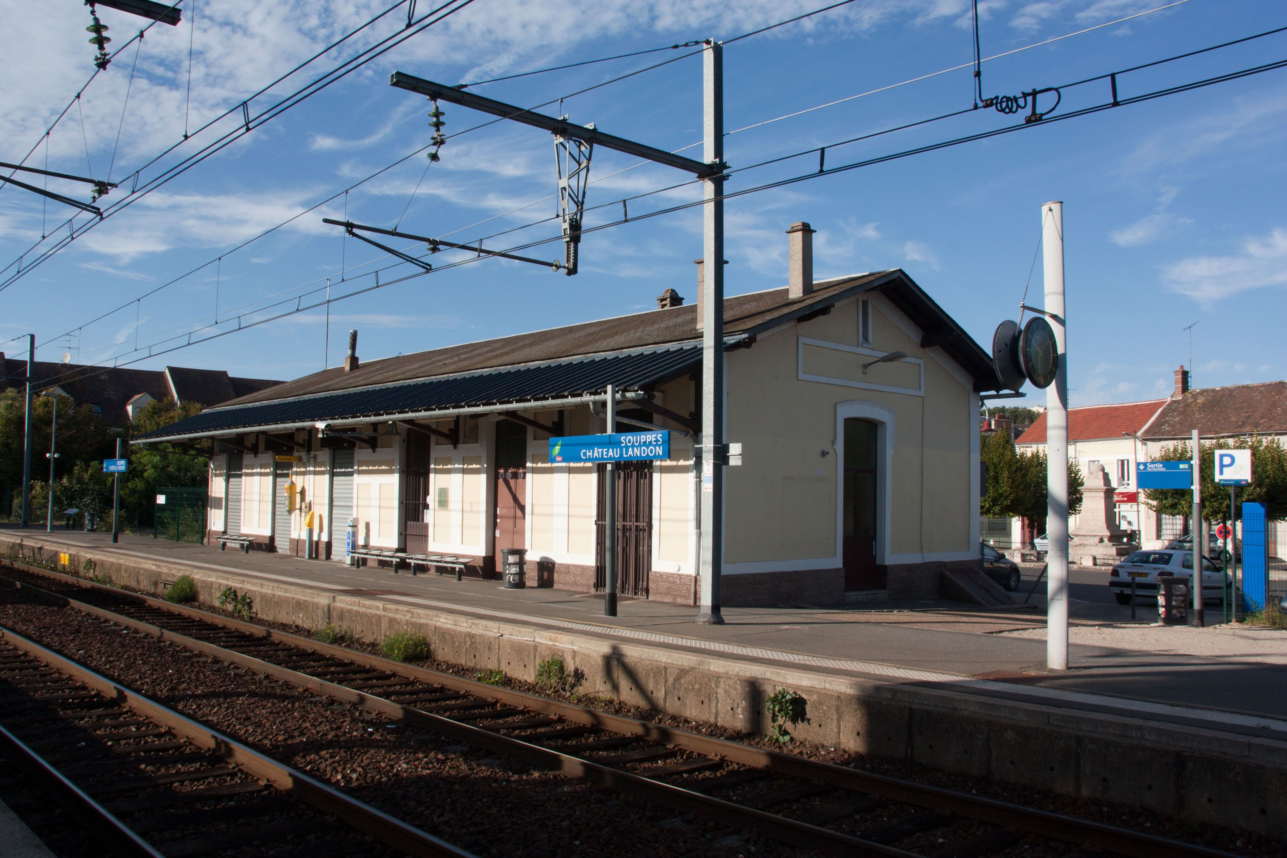 Gare de Souppes - Château-Landon, Souppes-sur-Loing, Seine-et-Marne, France.